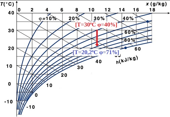 Przebieg chłodzenia ewaporacyjnego pośredniego